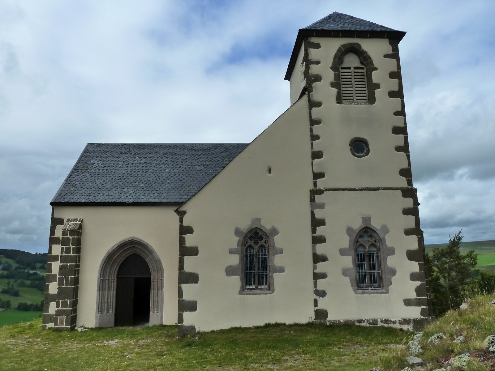 Chapelle Notre-Dame de Valentine - Ségur-les-Villas - Cantal - France